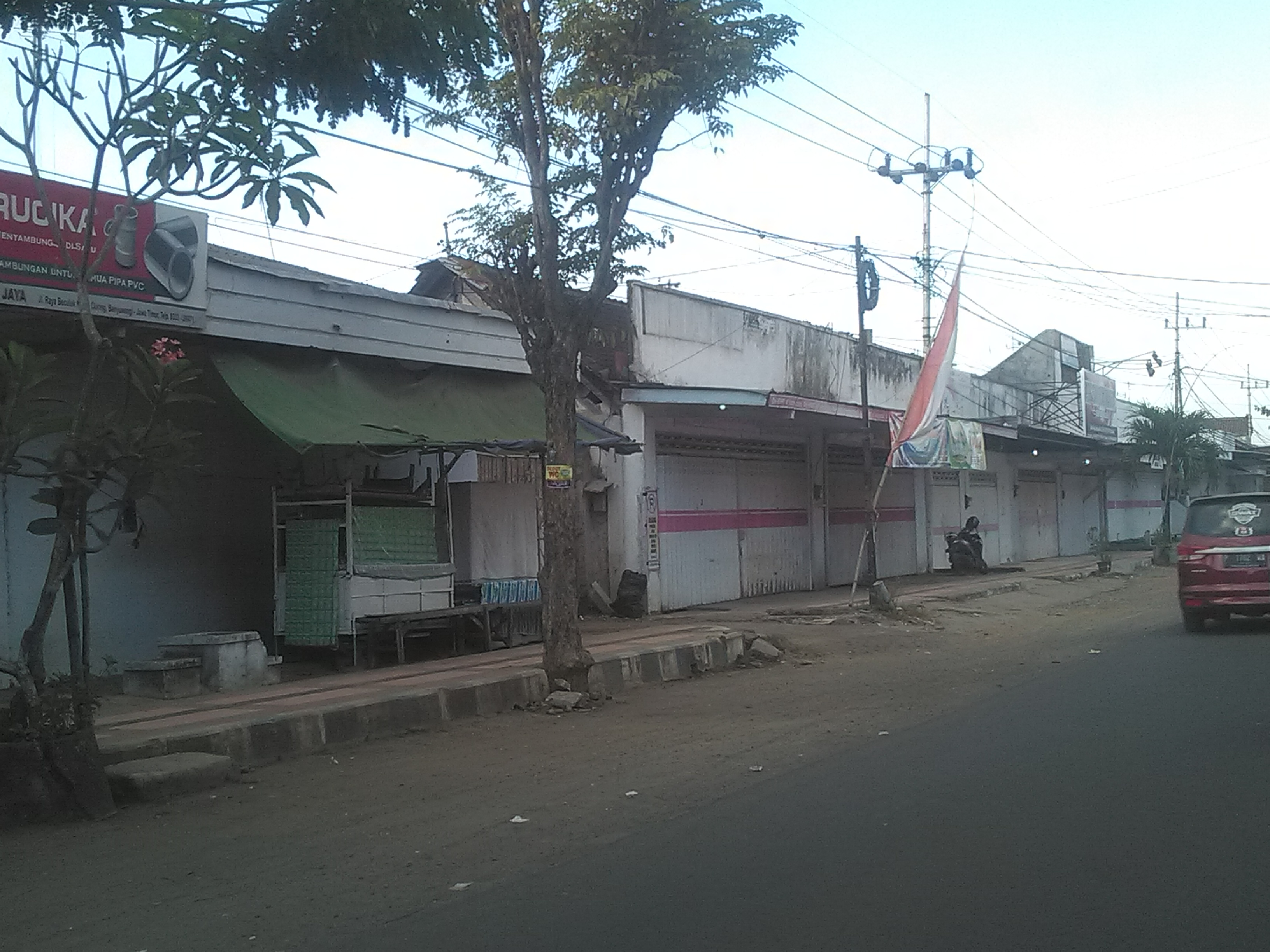 Kios Stasiun Benculuk, 2019